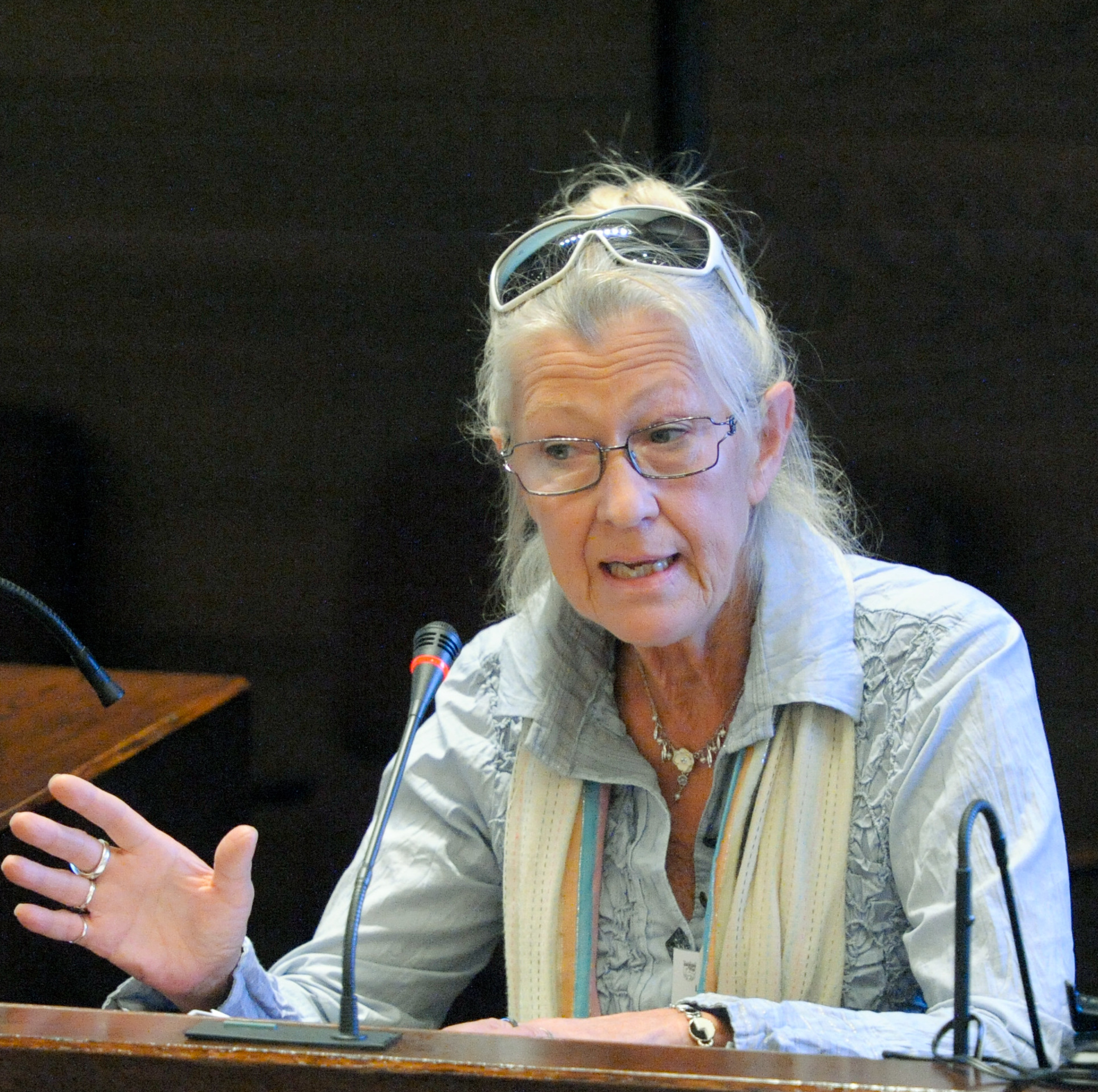 Lisbeth Grönfeldt Bergman (M) Sverige BSPC 19 Mariehamn Åland 2010